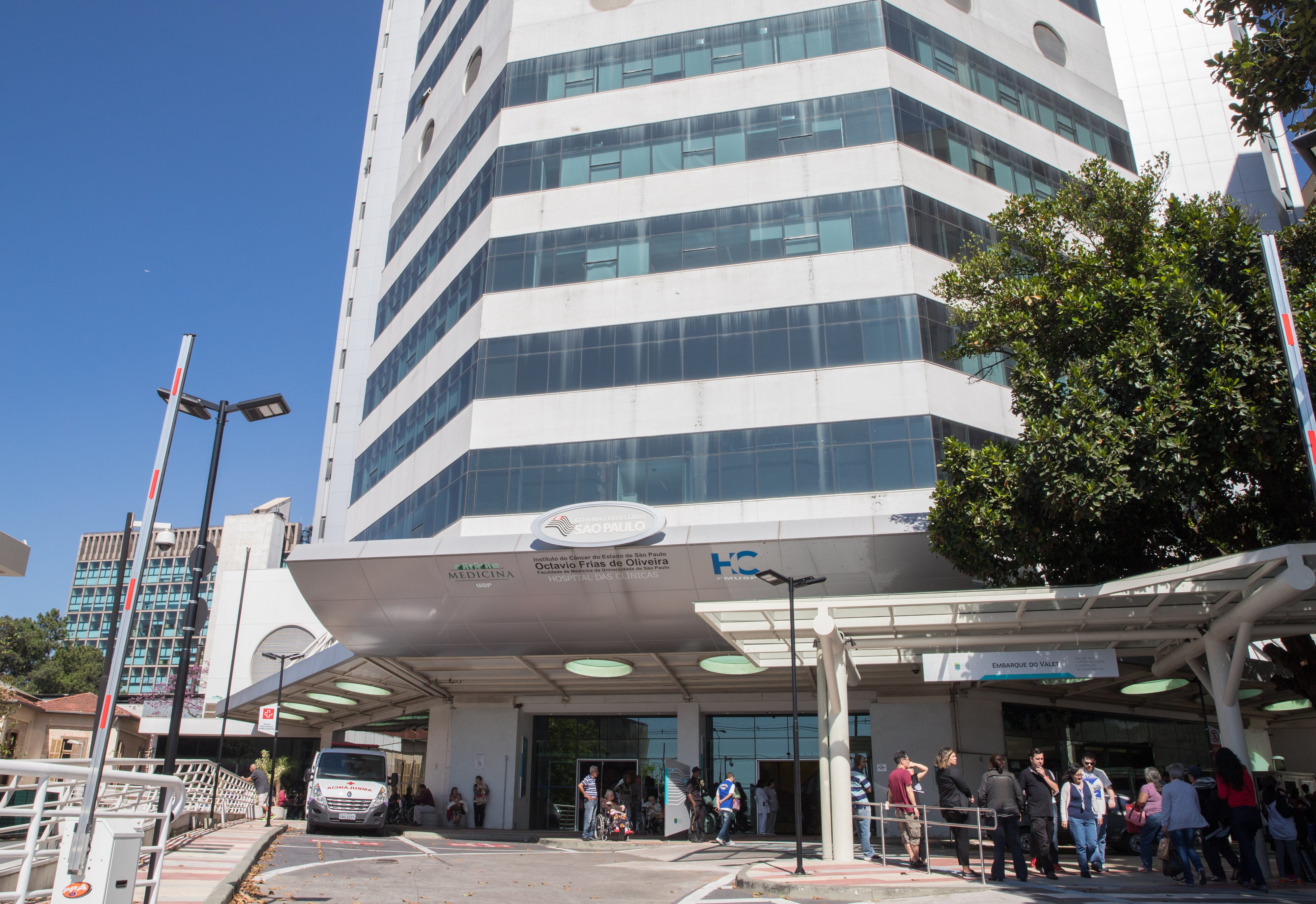 Fotorreportagem do ICESP - Procedimentos cirúrgicos e gerais do Hospital. Local: São Paulo/SP. Data: 20/07/2018. Foto: Governo do Estado de São Paulo